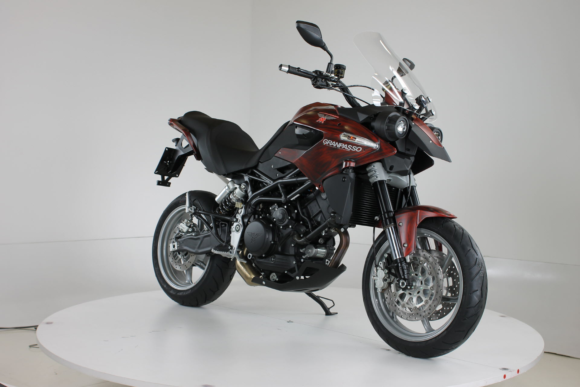 MM GPR in versione Special